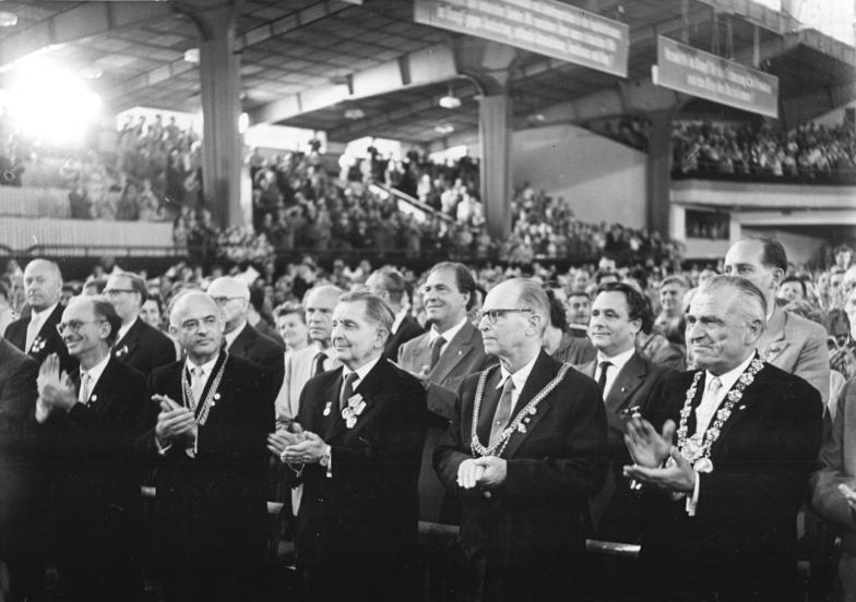 Zentralbild Quasch. 14.7.1958 V. Parteitag der SED vom 10. bis 16.7.1958 in der Werner-Seelenbinder-Halle, Berlin 5. Tag: UBz: Zu einem begeisterten Höhepunkt gestaltete sich die Begrüßung des Parteitages durch eine Delegation hervorragender Wissenschaftler, Angehöriger des sozialistischen wissenschaftlichen Nachwuchses. 1. Reihe von links nach rechts: Akademiemitglied Professor Dr. R. Rompe, Erster Direktor des Physikalischen Instituts der Deutschen Akademie der Wissenschaften; Seine Magnifizienz Professor Dr. W. Hartke, Rektor der Berliner Humboldt-Universität; Leninpreisträger Professor Dr. Thiessen, Leiter des Forschungsrates der DDR; der hervorragende Wissenschaftler des Volkes, Nationalpreisträger Professor Dr. Max Volmer, Präsident der Deutschen Akademie der Wissenschaft; und Seine Magnifizienz Professor Dr. G. Mayer, Rektor der Karl-Marx-Universität, Leipzig.